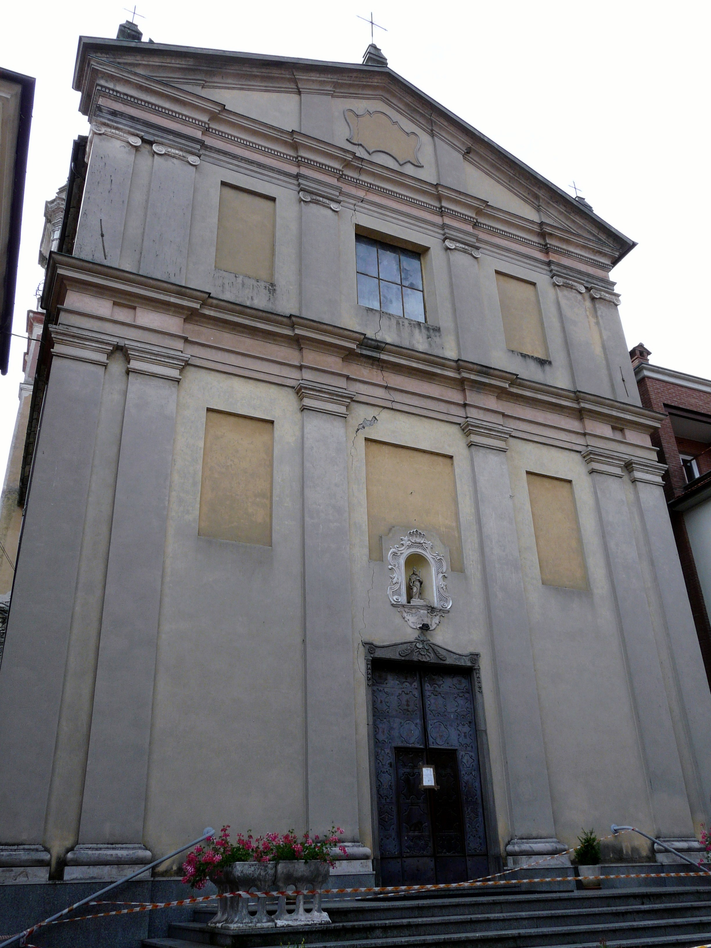 Chiesa di San Marziano, Ottone, Emilia-Romagna, Italia